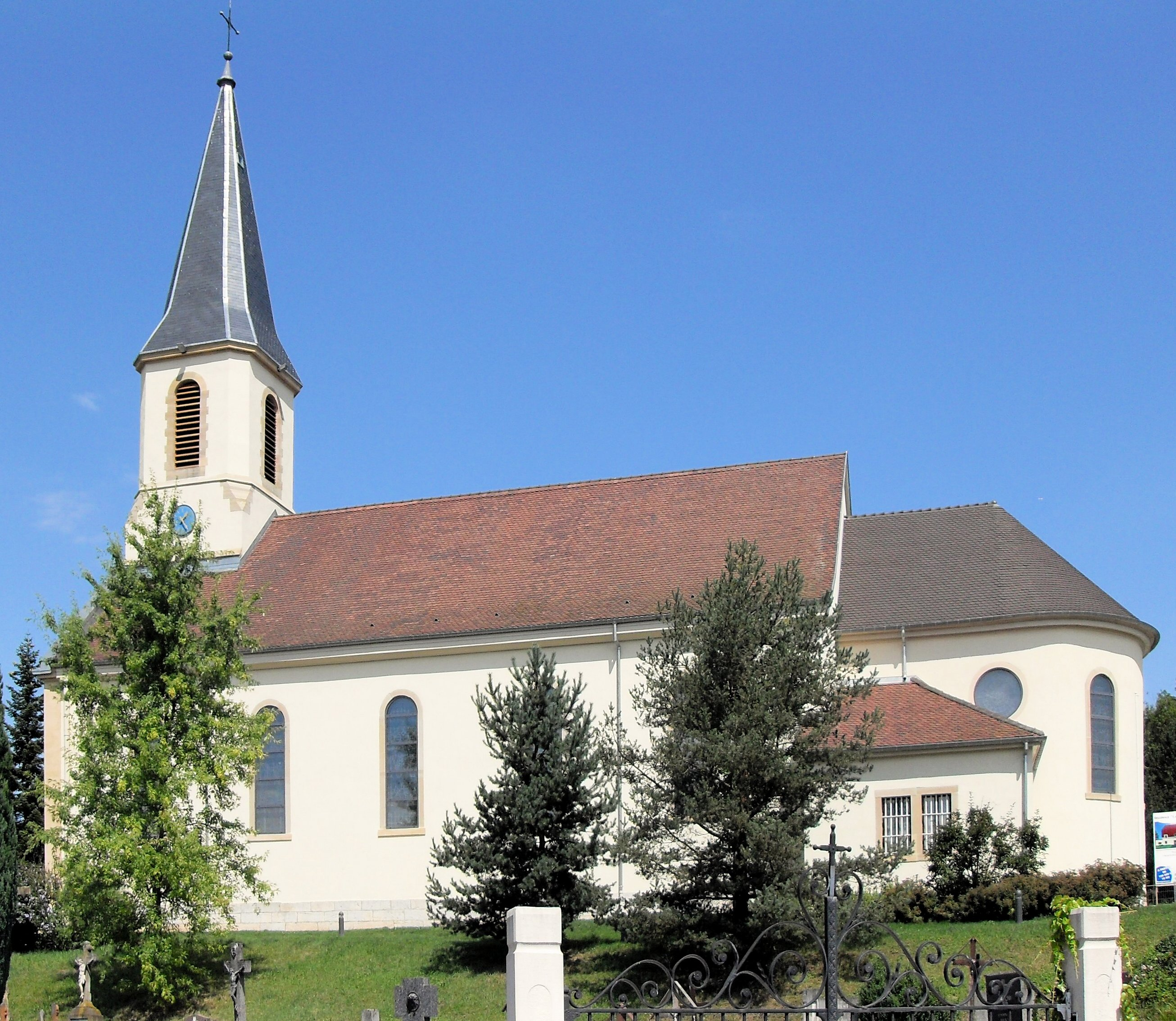 L'église Saint-Jean-Baptiste à Roppentzwiller